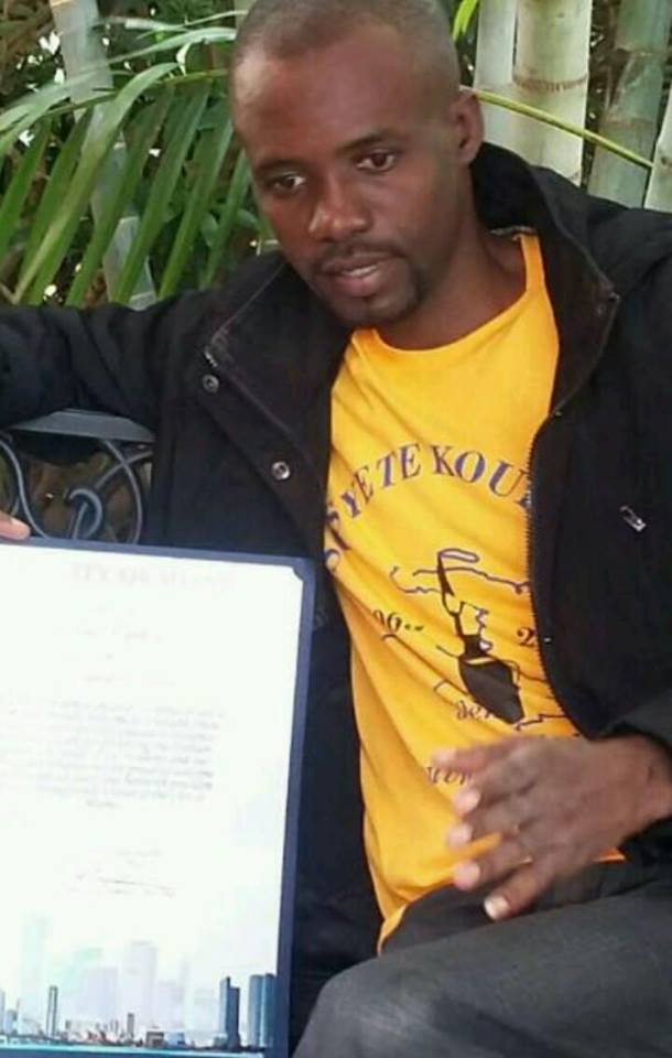 La photo de Iléus PAPILLON